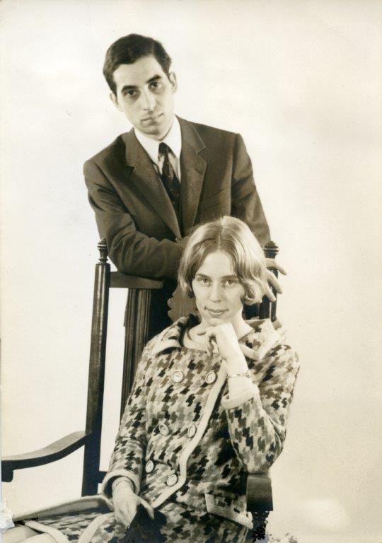 Genomen op trouwdag Gancalves Andriessen